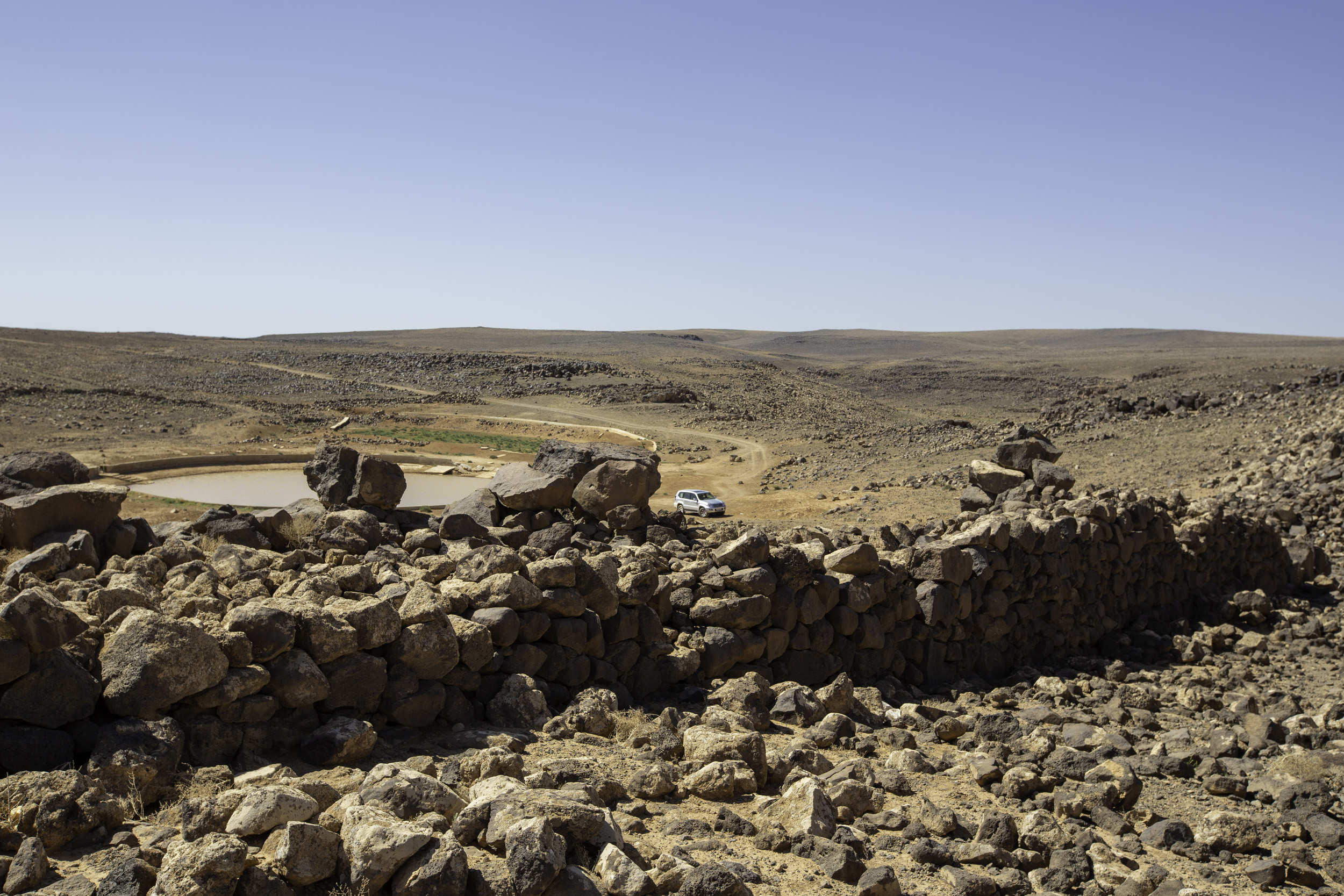 Jawa (Ruins)